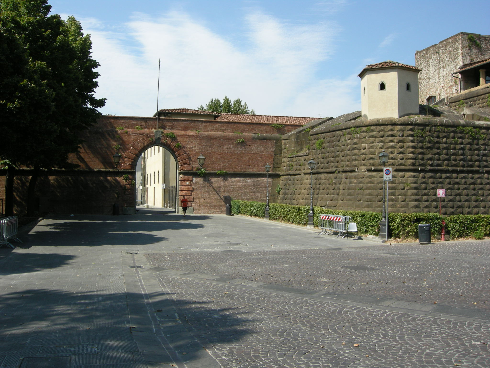 Fortezza da basso, ingresso